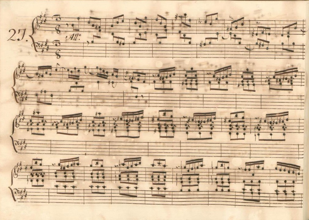 La sonate K. 244, telle qu'elle se présente dans le manuscrit de Parme, volume V no. 27.